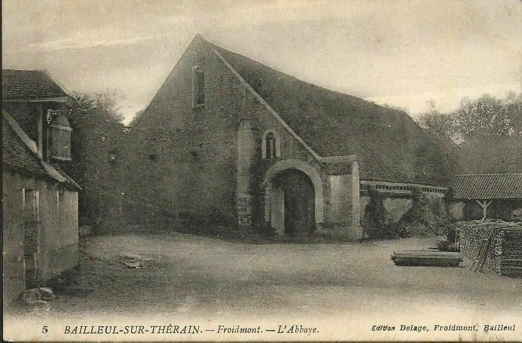 La grange monastique de l'abbaye de Froidmont à Bailleul-sur-Thérain (Oise, France). Carte postale vers 1900, photographe inconnu